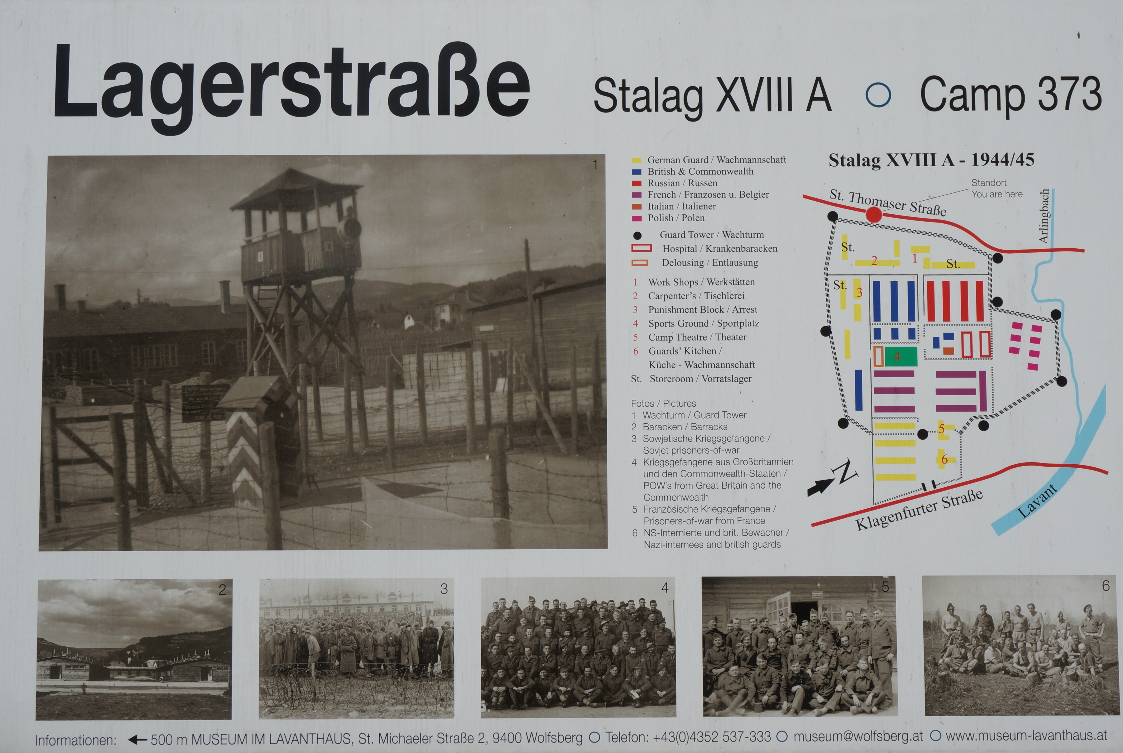 Infotafel Lager Stalag XVIII A in Wolfsberg Priel während des II. Weltkrieges 1944/1945